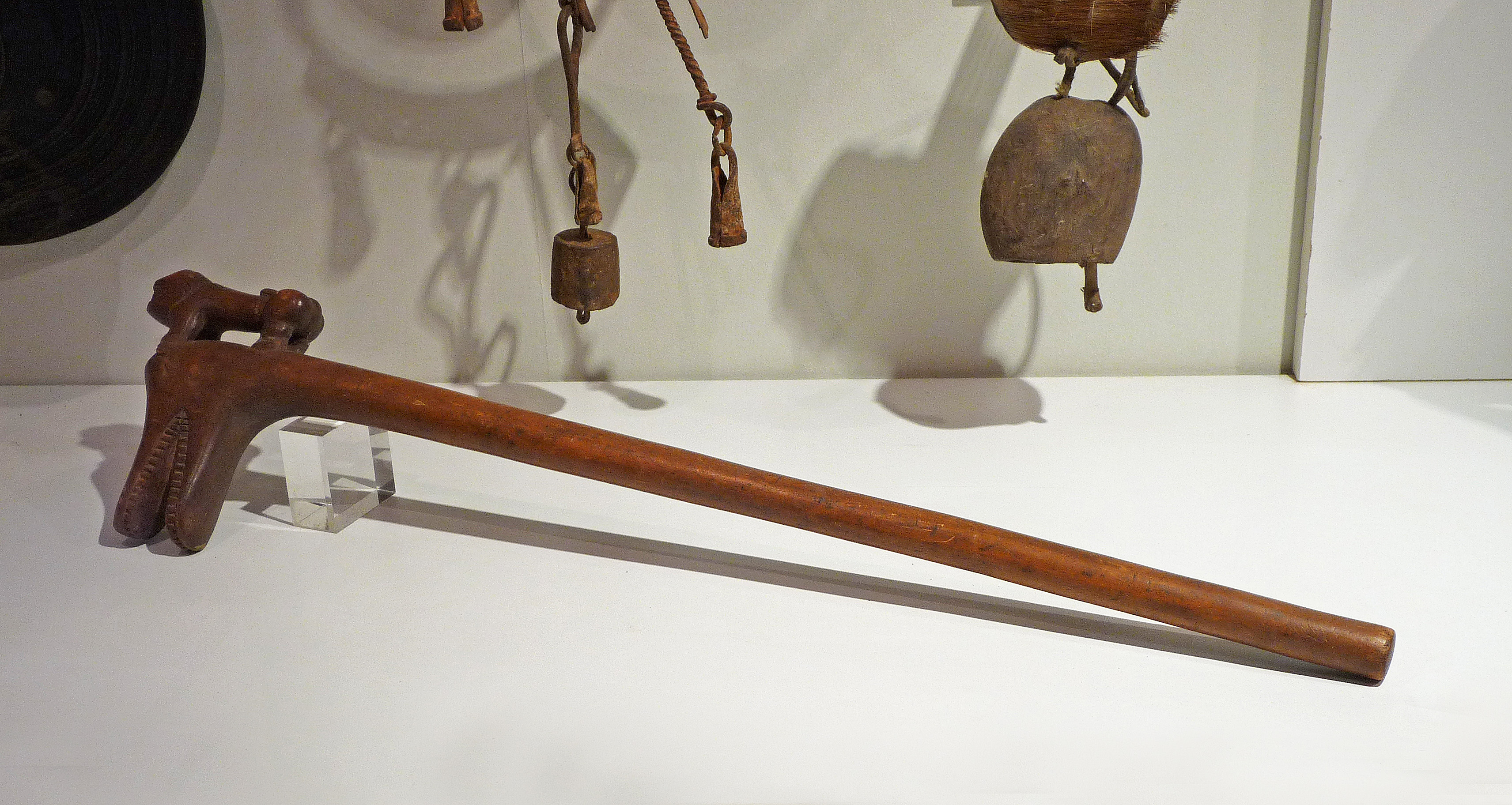 Récade au lion (le lion était le symbole du roi Glélé). Bénin. Bois. Musée barrois (Bar-le-Duc)